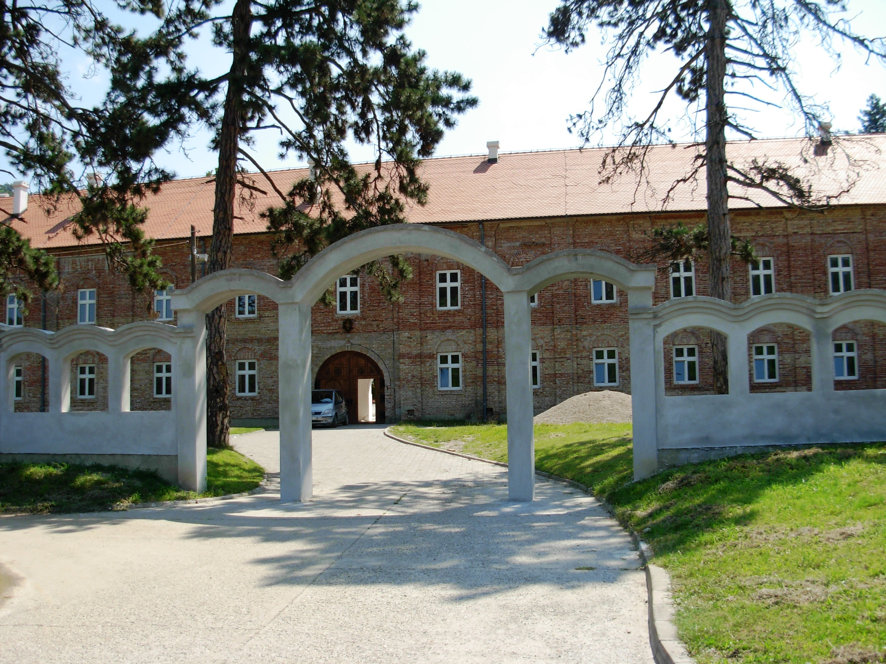 Novoizgrađeni konak manastira Rakovac u centru istoimenog sela u podnožju Fruške gore.